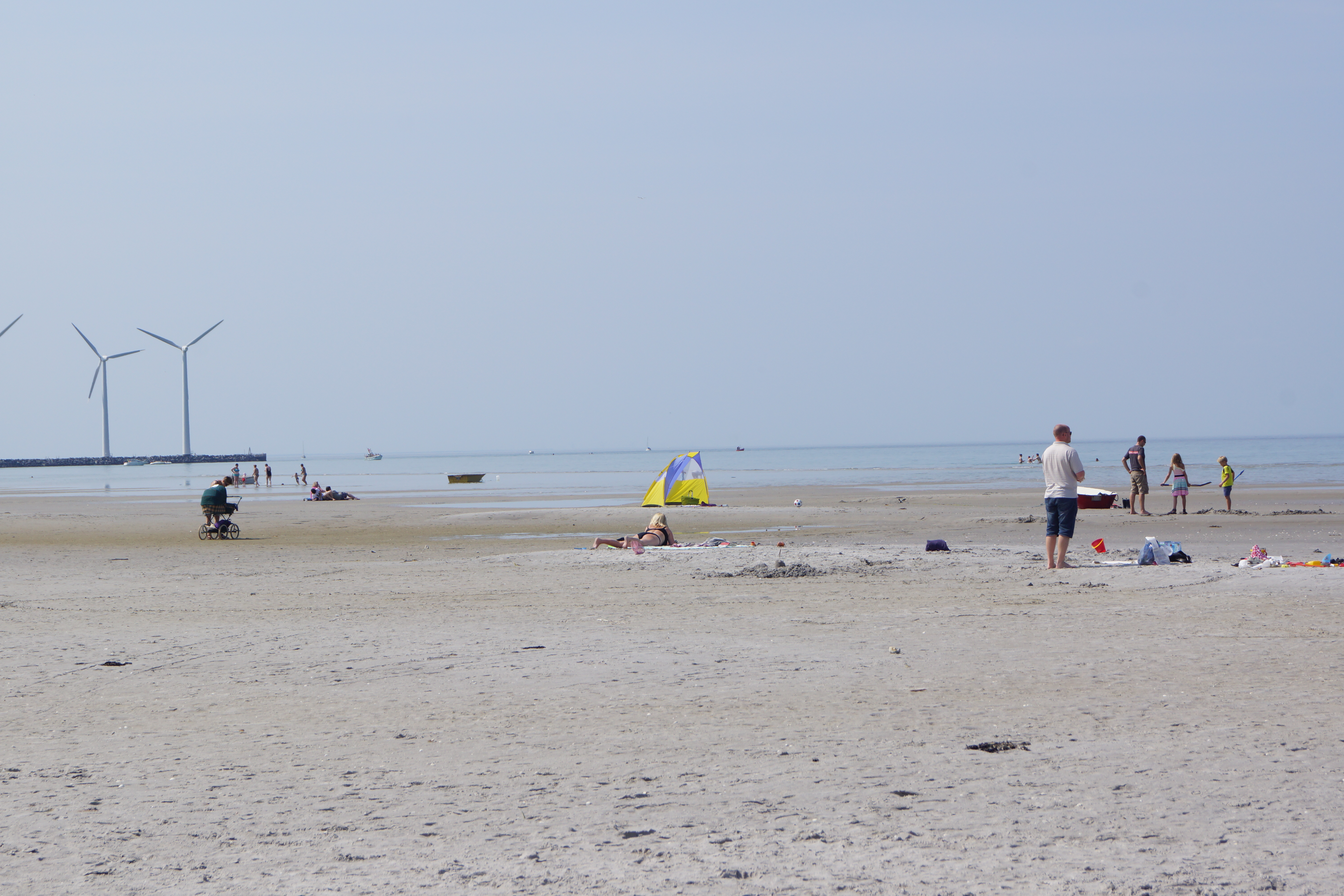 Bønnerup Strand møller